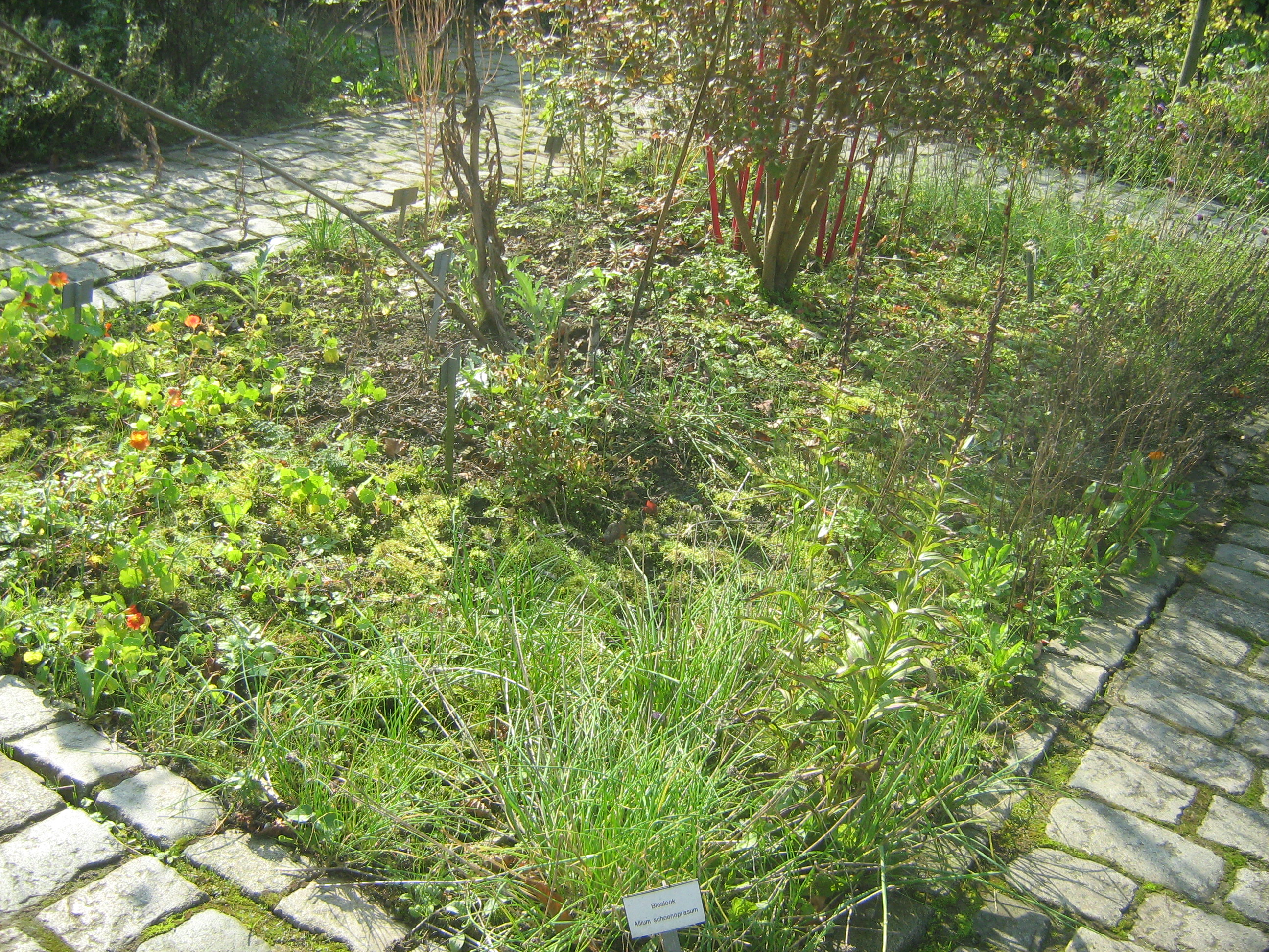 De tuin naast de Vanbutselesmolen in Wevelgem